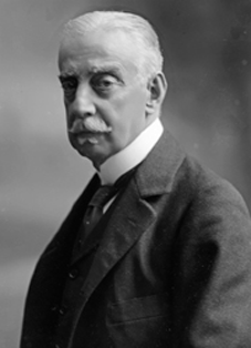 Duca Giuseppe Avarna